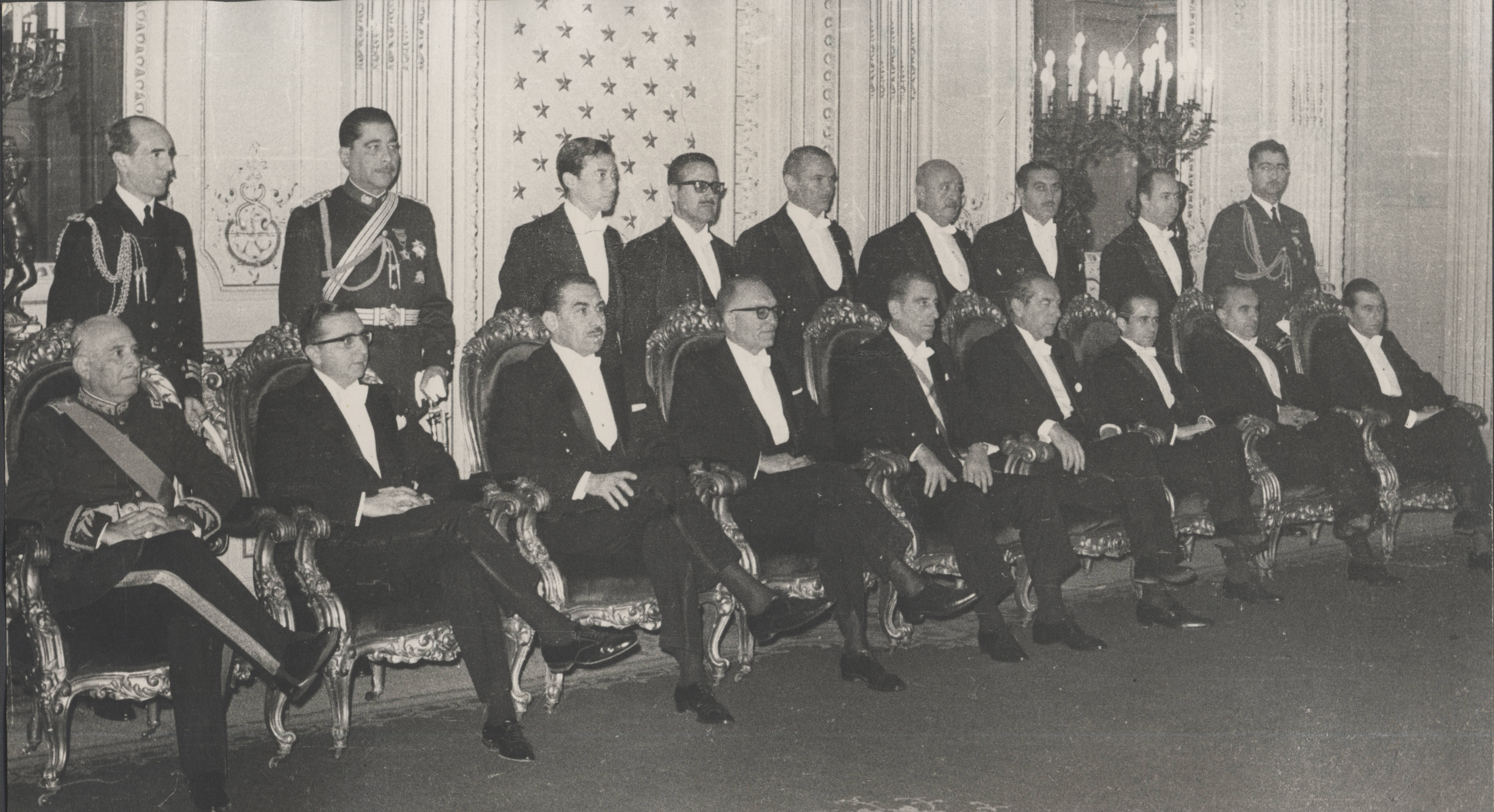 Ministros de Estado del presidente Eduardo Frei Montalva.